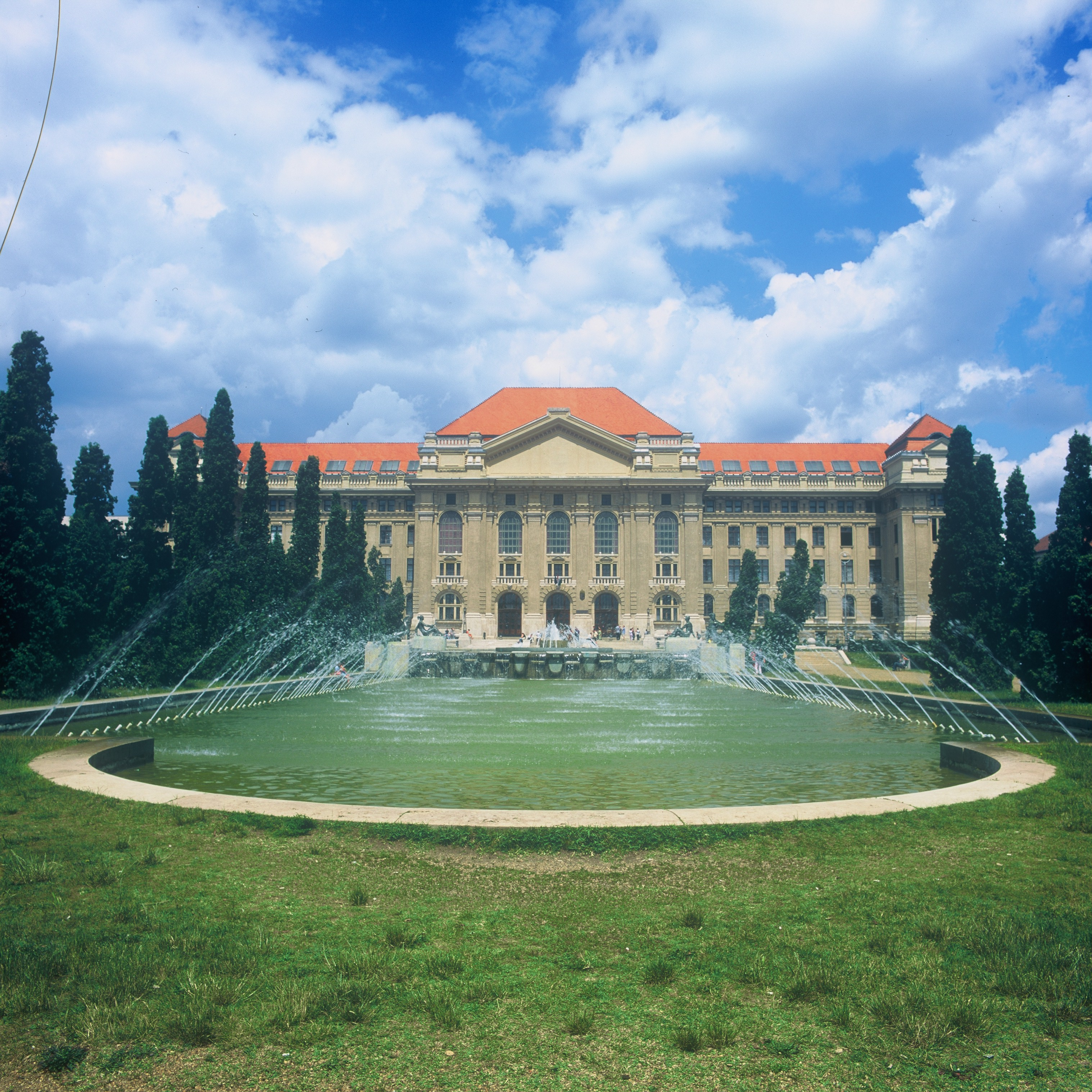 A Debreceni Egyetem TEK főépülete